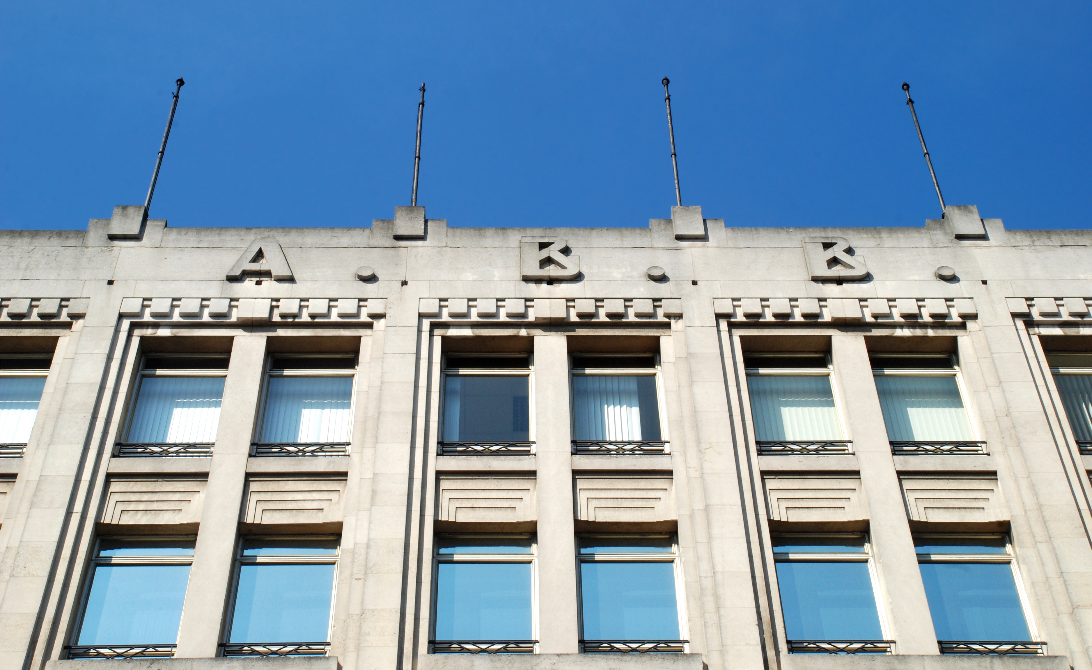 Belgique - Bruxelles - Ancien siège de la Banque Agricole de Belgique